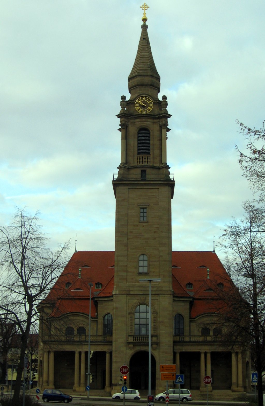 Friedenskirche,Garnisonskirche,evangelisch,Ludwigsburg,Württemberg,Germany